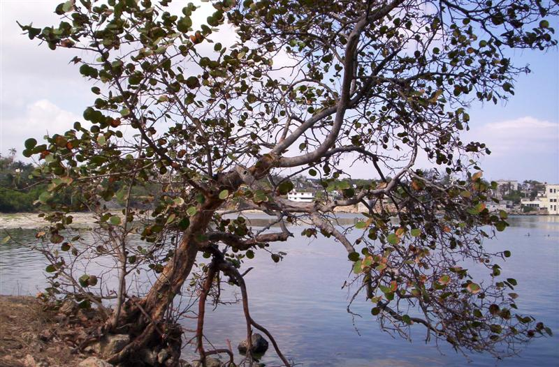 arbol aferado a la vida!